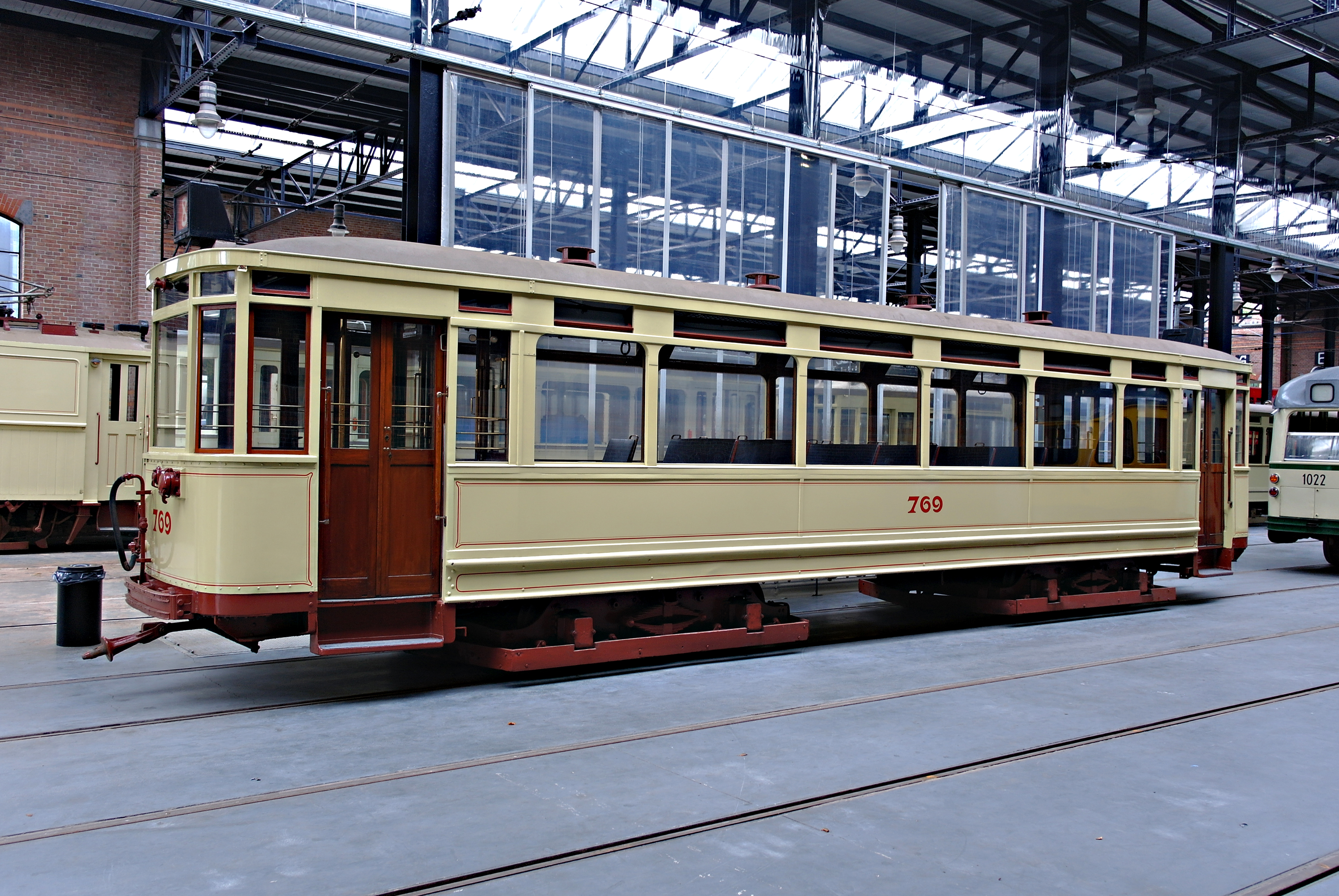 Aanhangwagen 769 uit het museumbestand van het HOVM